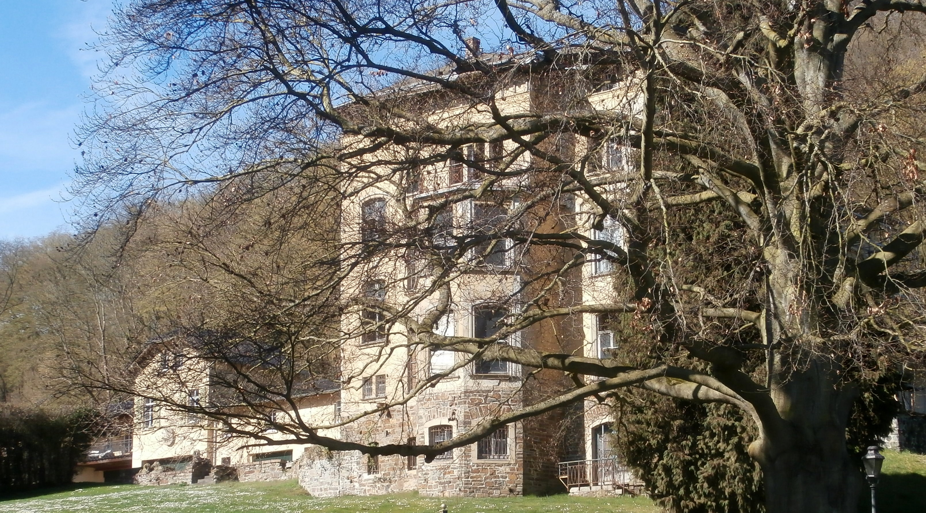 Haus Herresberg, Kölner Straße 9, Remagen: Ansicht von der Bundesstraße 9